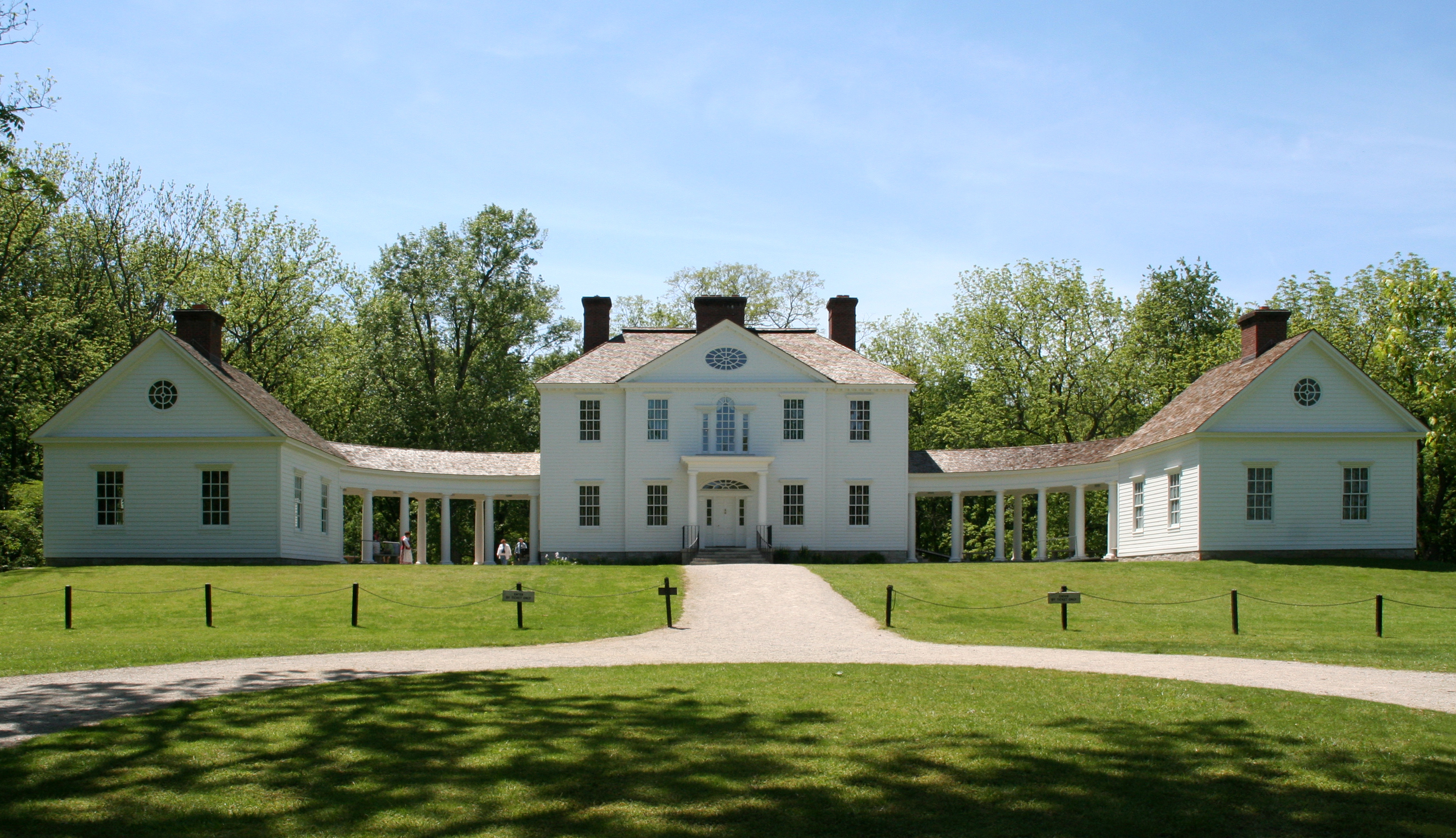 Rebuilt Blennerhasset Mansion in Blennerhassett Island Historic State Park